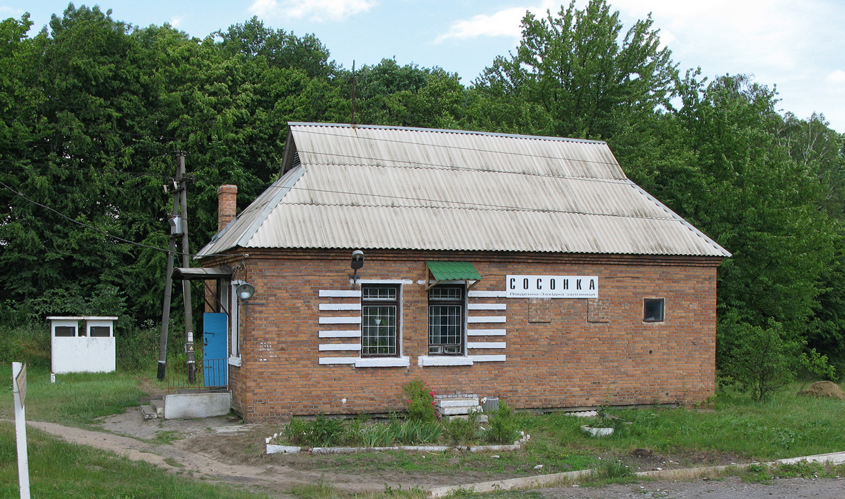 Сосонка